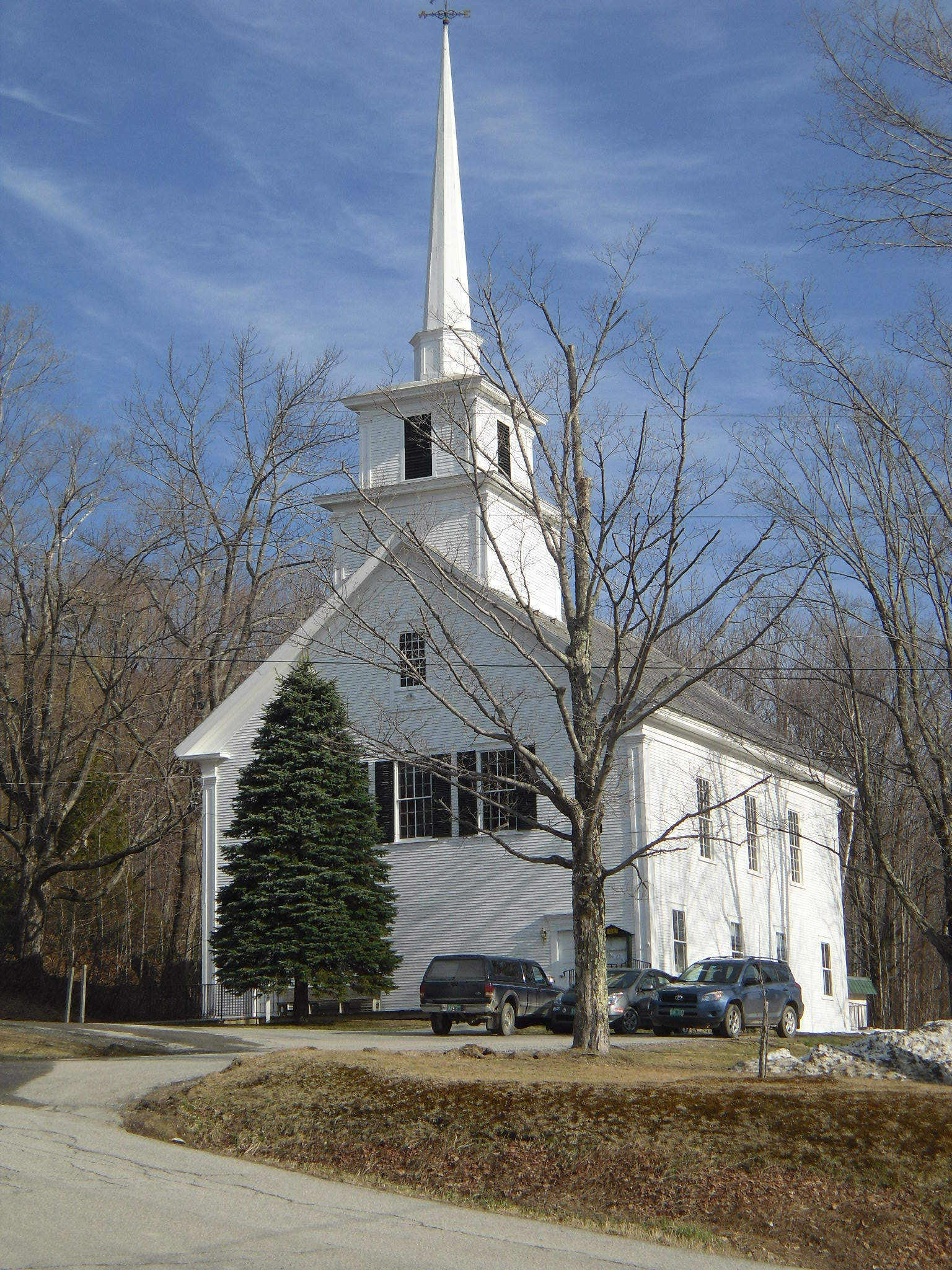 A Church in Windham, Vermont